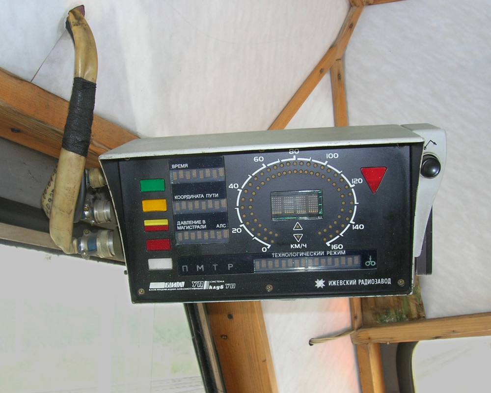 Блок индикации комплексного локомотивного устройства безопасности для путевых машин КЛУБ-УП в кабине автомотрисы АС1А.2-2942 «Уралочка»